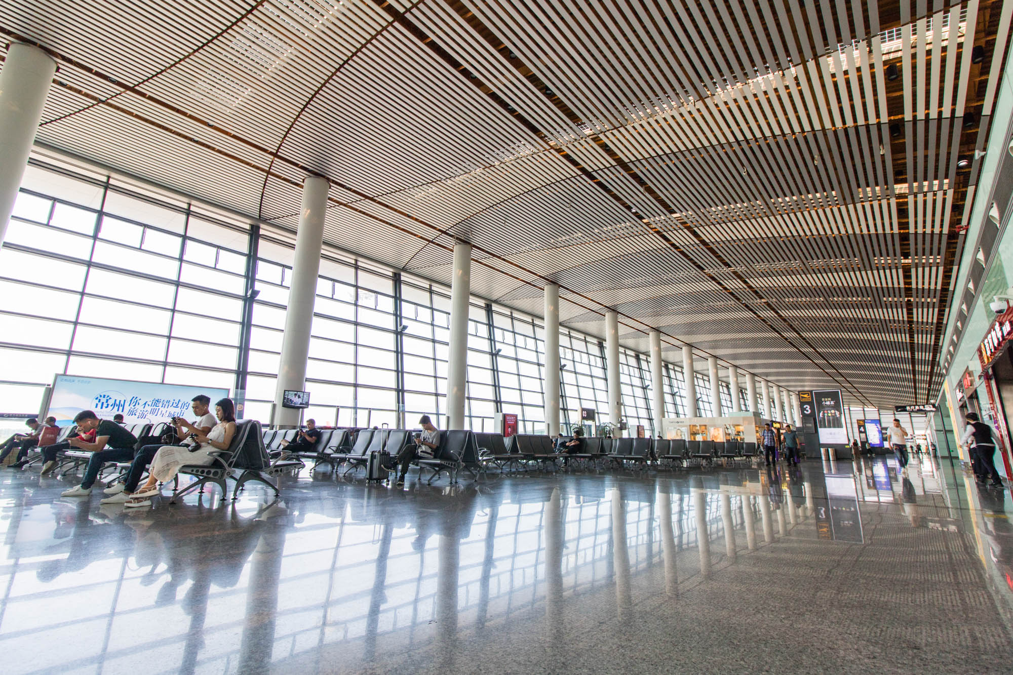 中文（中国大陆）: 常州奔牛国际机场航站楼候机厅